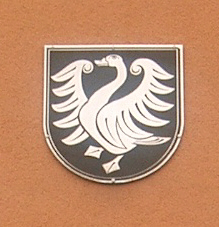 Das ehemalige Wappen von Untersteinbach am Alten Rathaus